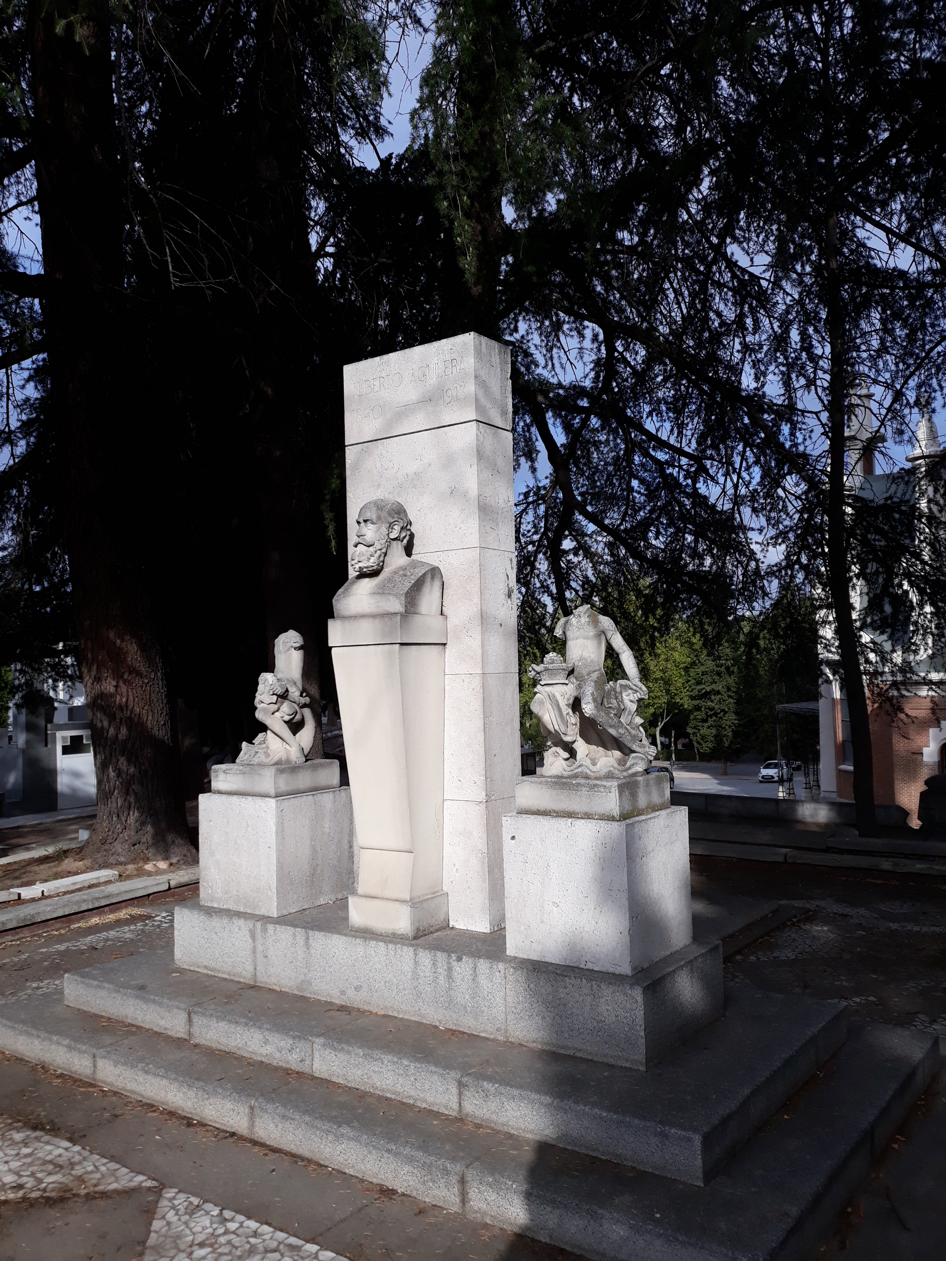 Das Grab des spanischen Politikers (Innenminister, Bürgermeister Madrid) Alberto Agulera auf dem Almudena-Friedhof in Madrid.